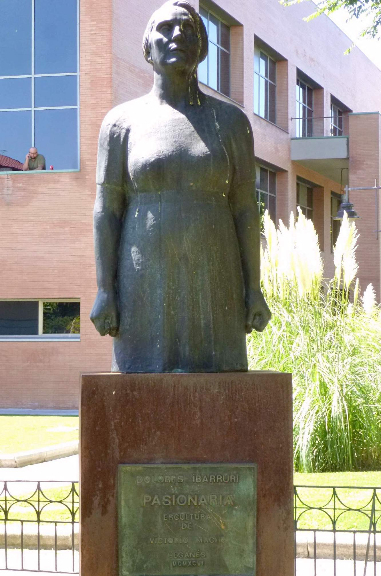 Leganés - Monumento a Pasionaria